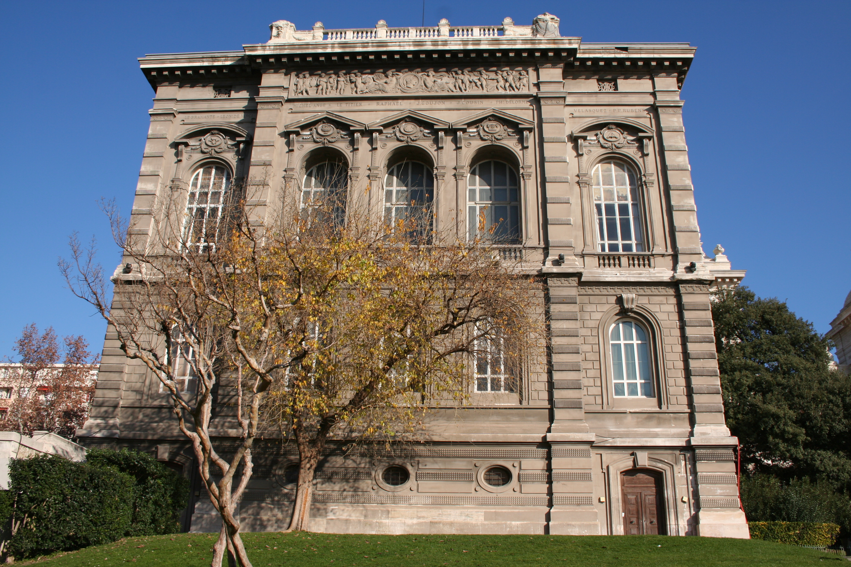 Palais Longchamp, Marseille (France).